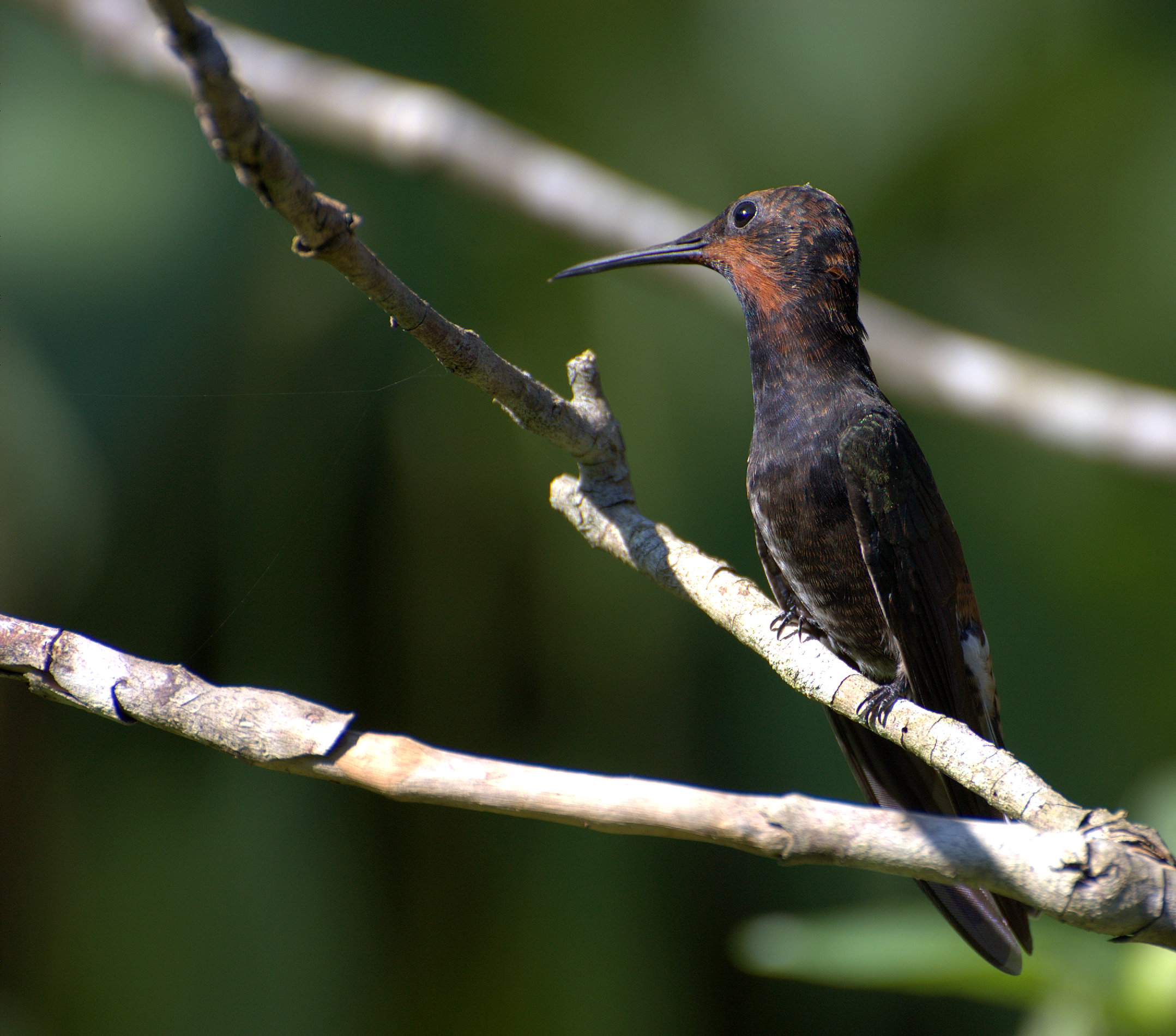 Chácara Antonio Wuo, Mogi das Cruzes-SP